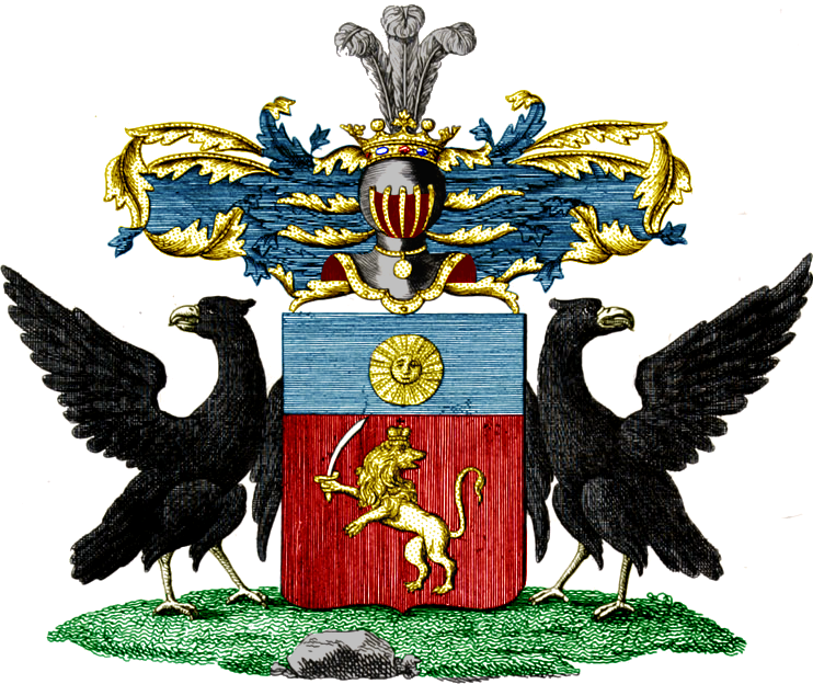 Герб рода Беклемишевых